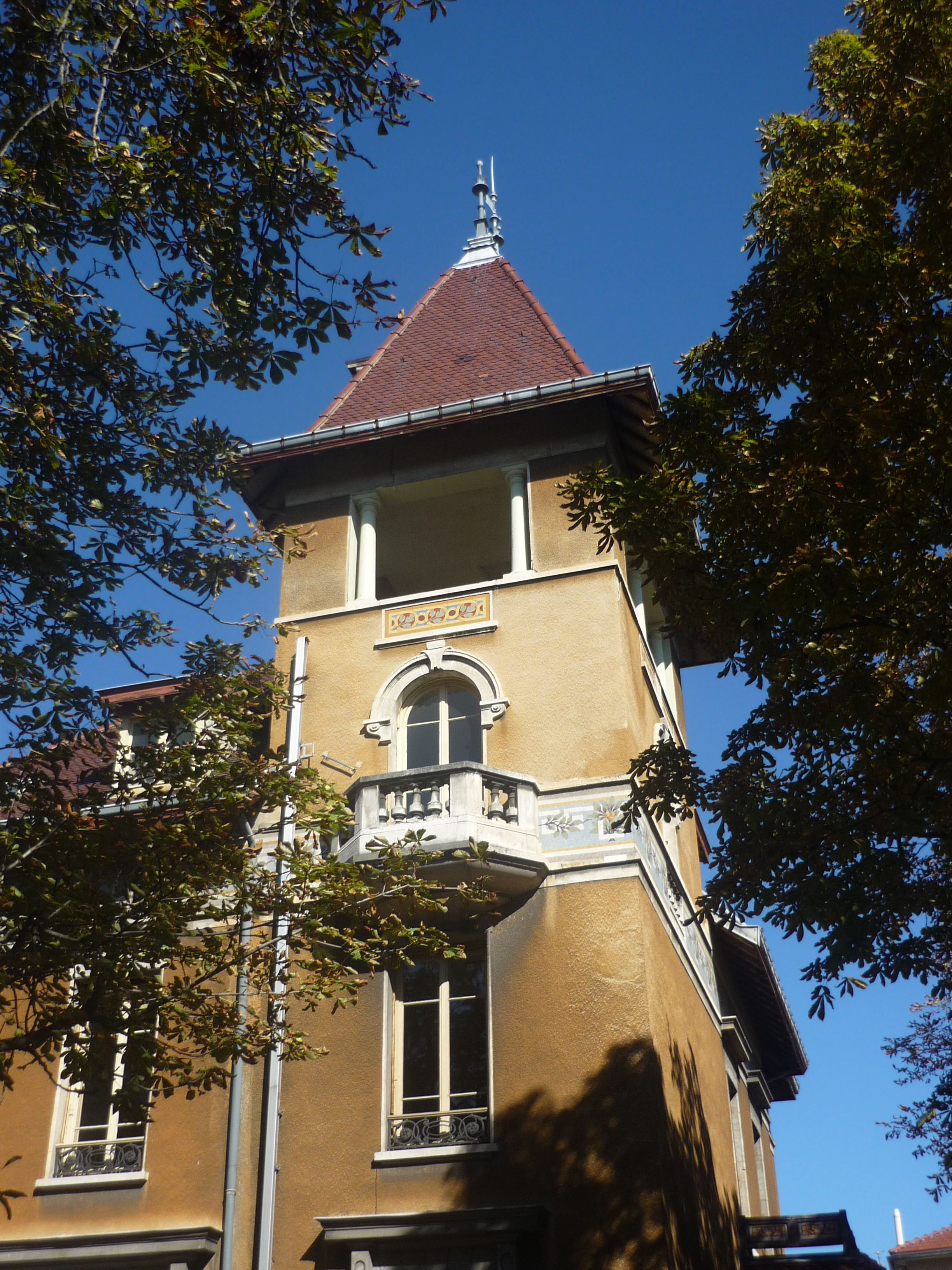 Villa Berliet dans le 3e arrondissement de Lyon. Inscrit au titre des monuments historiques .